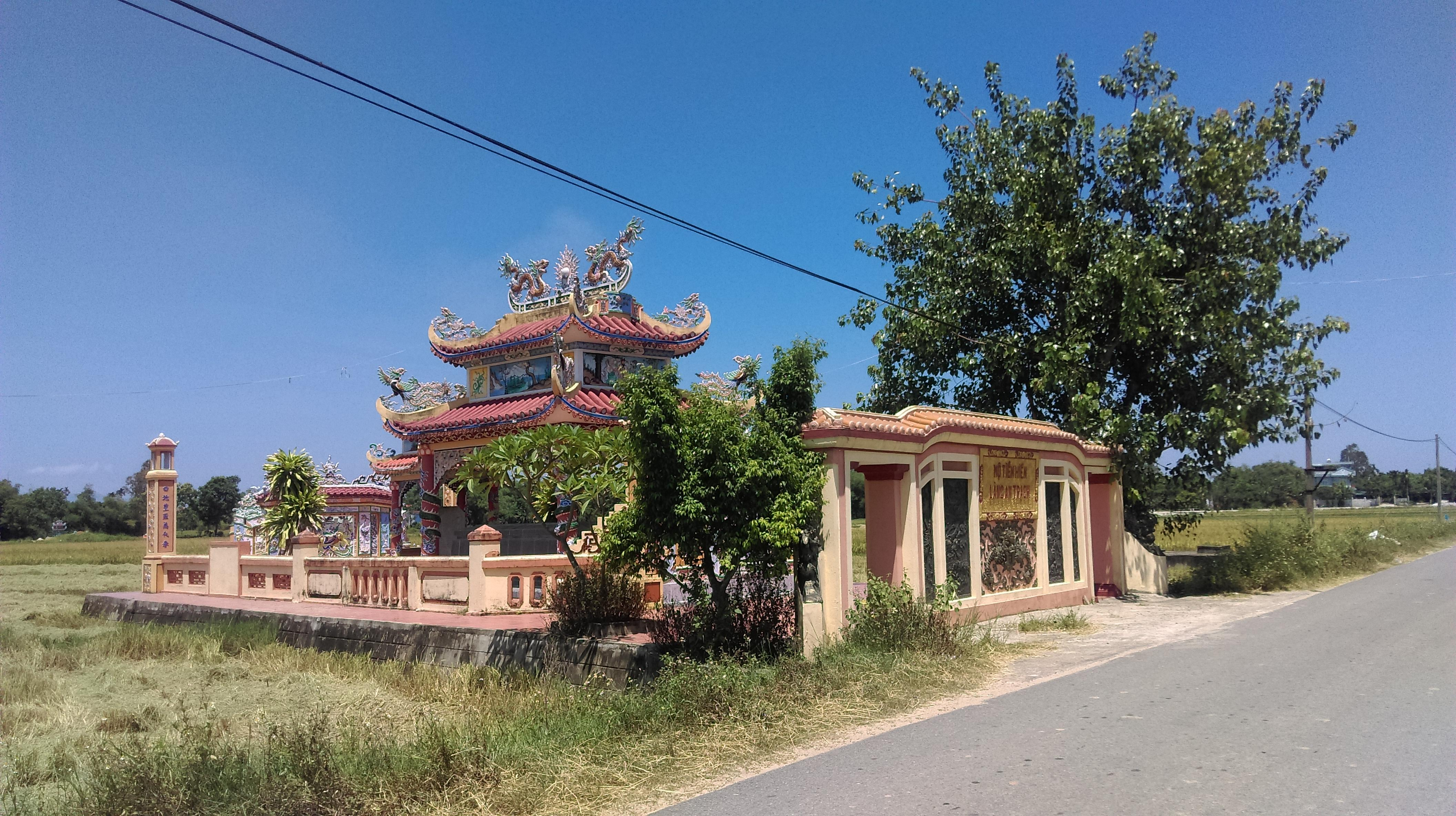 Mộ Tiền hiền làng An Trạch, Hòa Tiến, Hòa Vang, Đà Nẵng